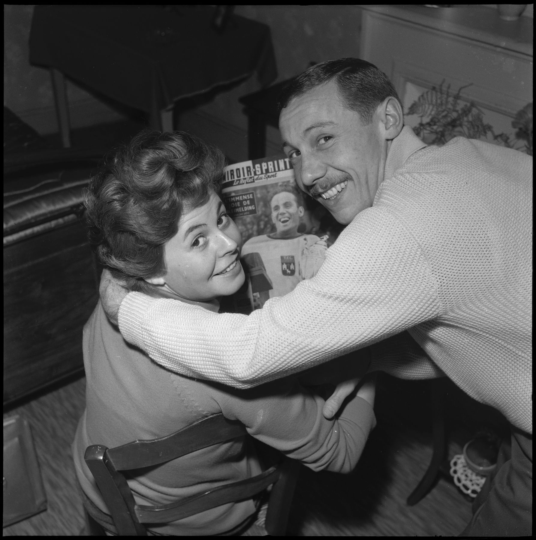 Domicile de Robert Bocchi. 1958-1959. Vue de Robert Bocchi, joueur du Toulouse Football Club, lisant une revue de Miroir-Sprint, avec sa femme.